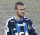 Mattias Jonson, Djurgårdens IF.